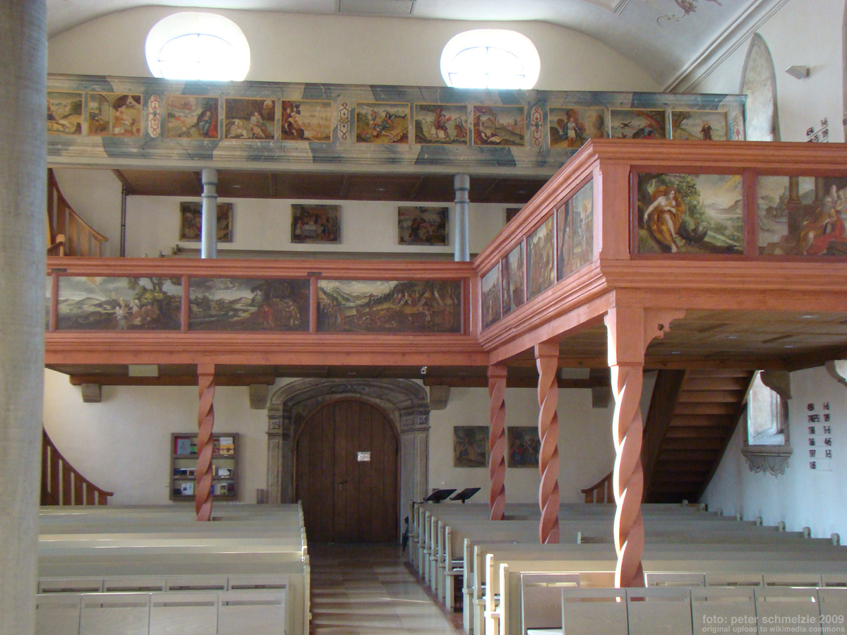 Westempore der Kilianskirche in Bretzfeld-Waldbach